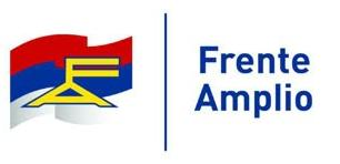 Logo del Frente Amplio, diseñado por Manuel Espínola Gómez.